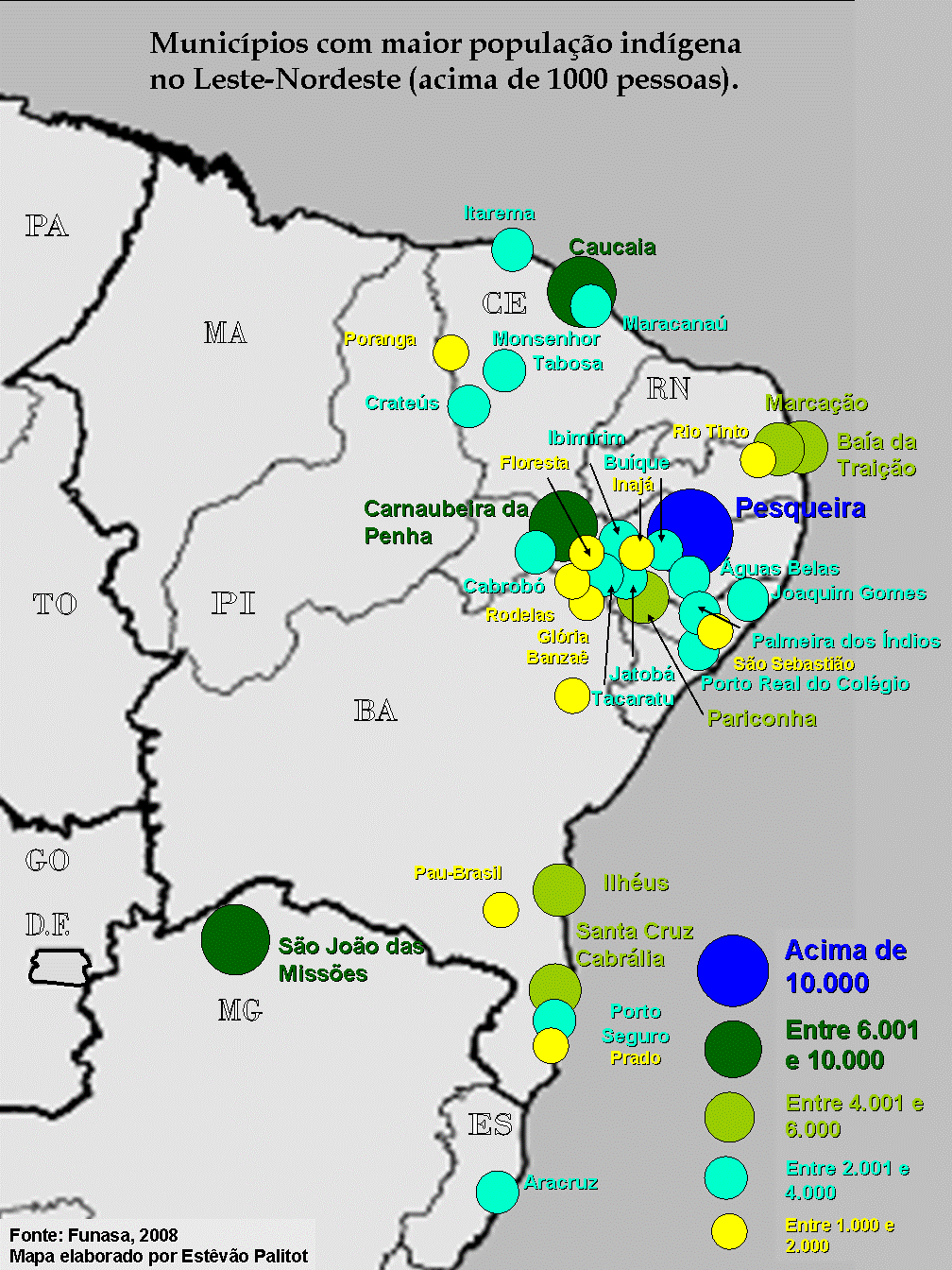 População Indígena no Leste Nordeste por municípios de acordo com a FUNASA. 2008.